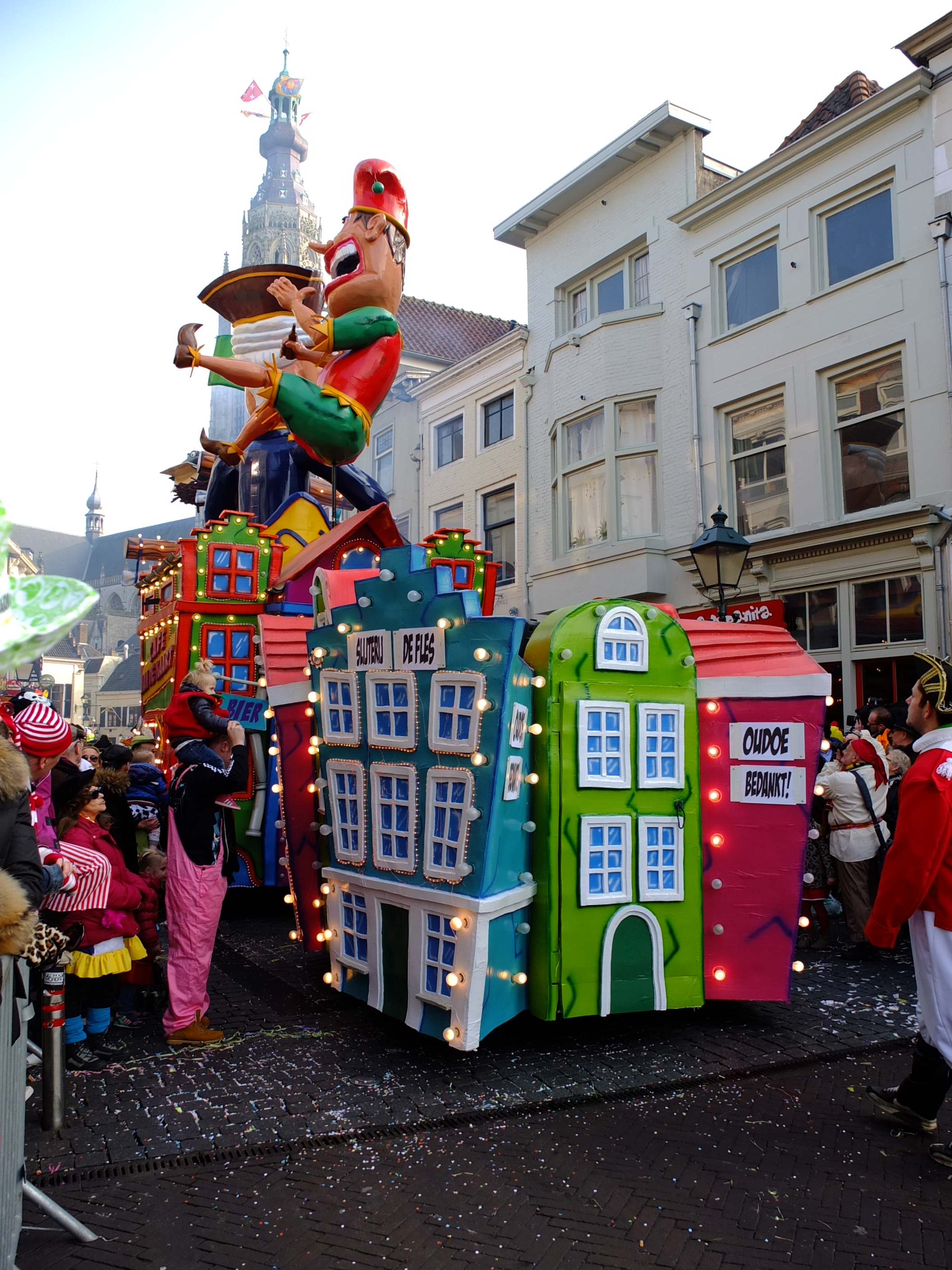 Grote Optocht 2015